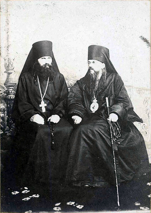 Епископ Пермский и Соликамский Иоанн (Алексеев) и игумен Варлаам (Коноплёв)